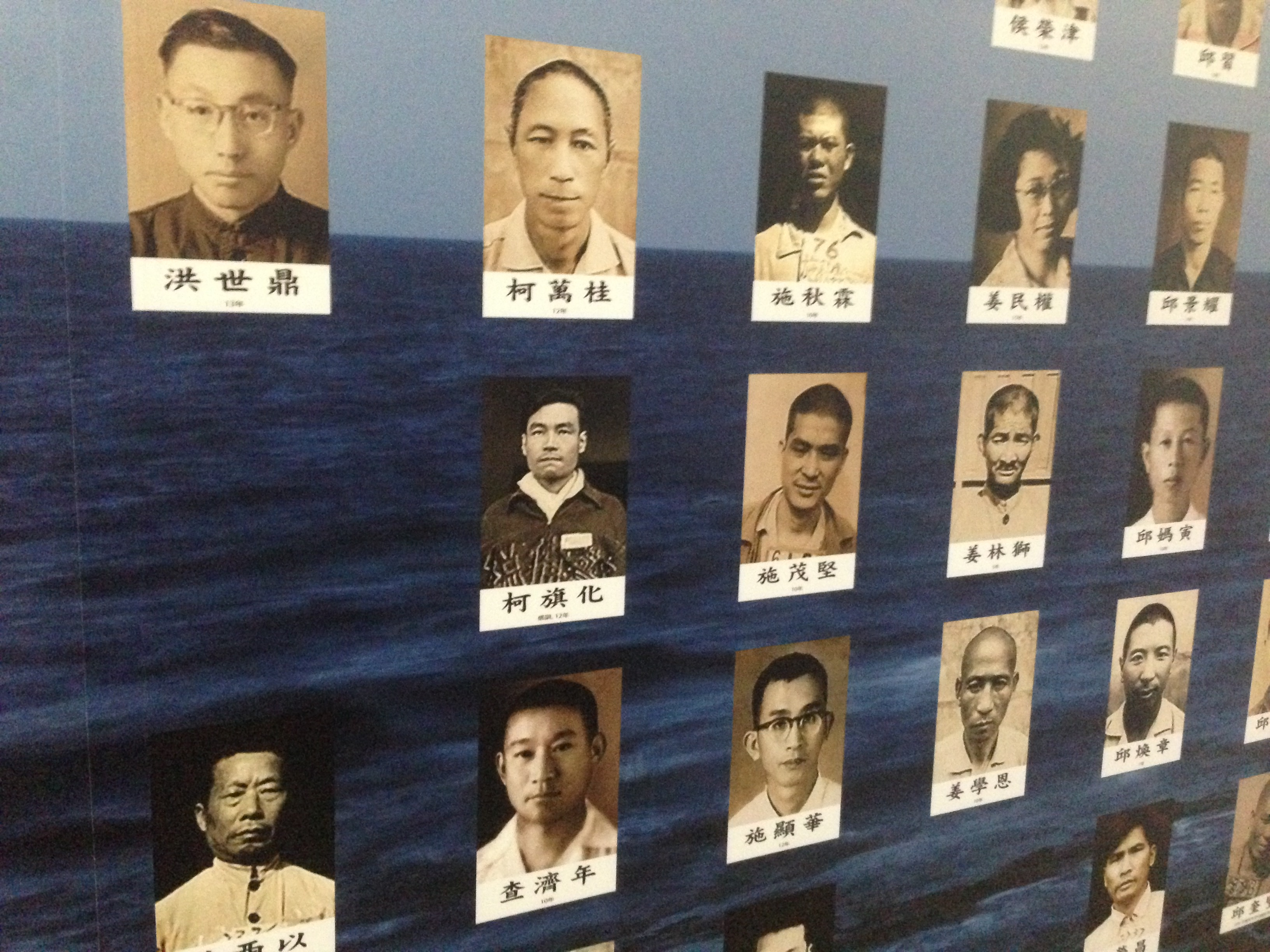 綠島人權文化園區新生訓導處第三大隊展示區的部分囚犯照片